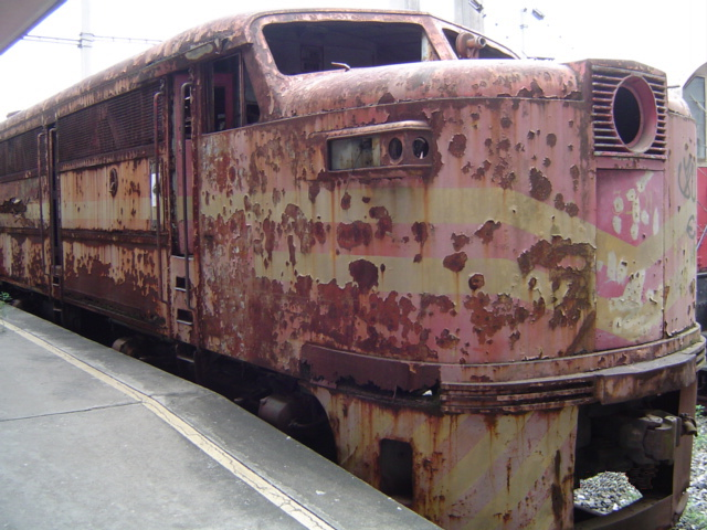 Locomotiva FA-1 RFFSA (Ex-EFCB), na Estação Barão de Mauá - Rio de janeiro - Brasil